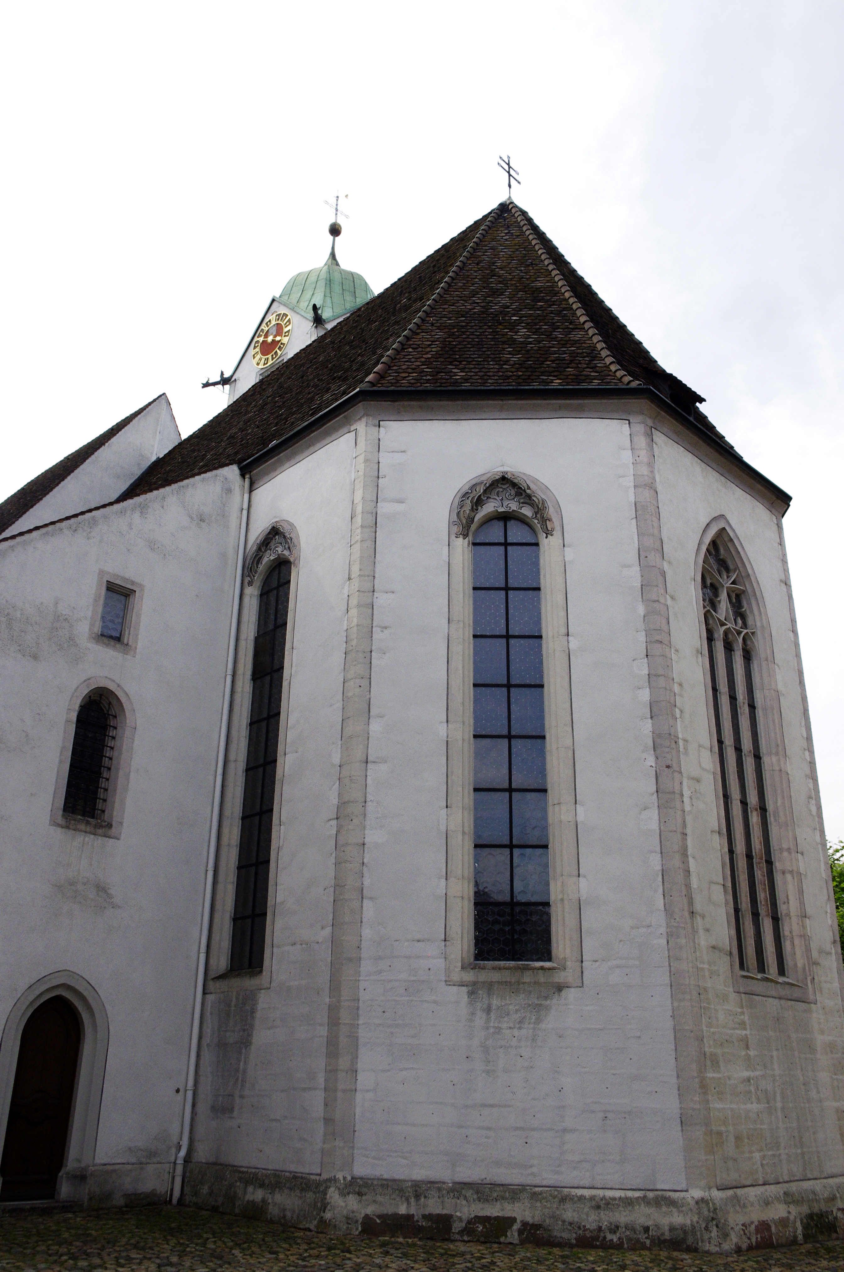 Kirche - Rheinfelden im Aargau, Schweiz